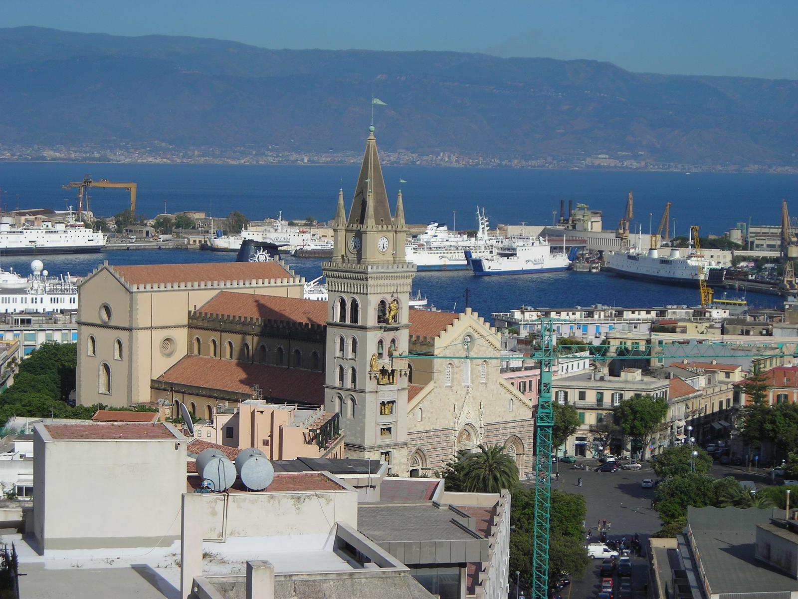 Duomo di Messina